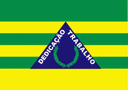 BANDEIRA ITABAIANINHA